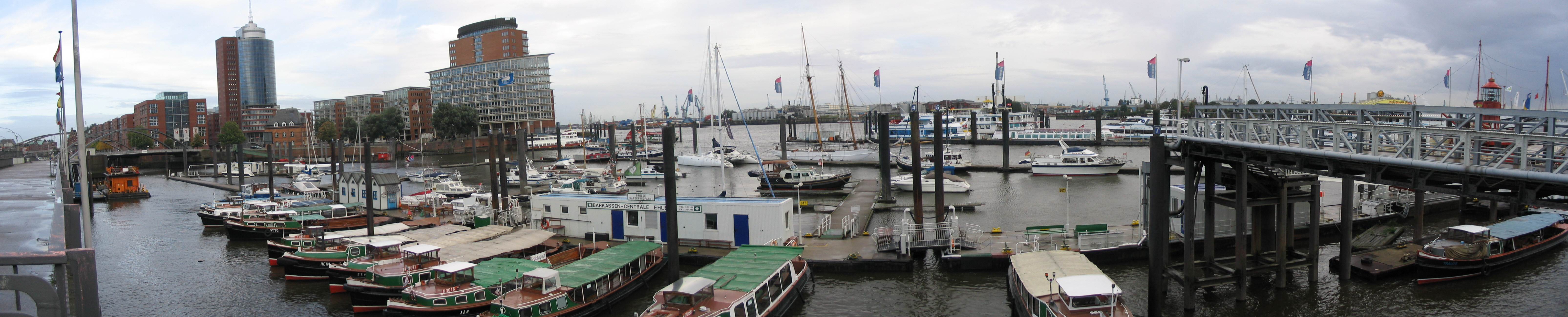 Panorama des Hamburger Hafens mit Kehrwieder eigene Aufnahme Benutzer:AlterVista September 2004 GFDL